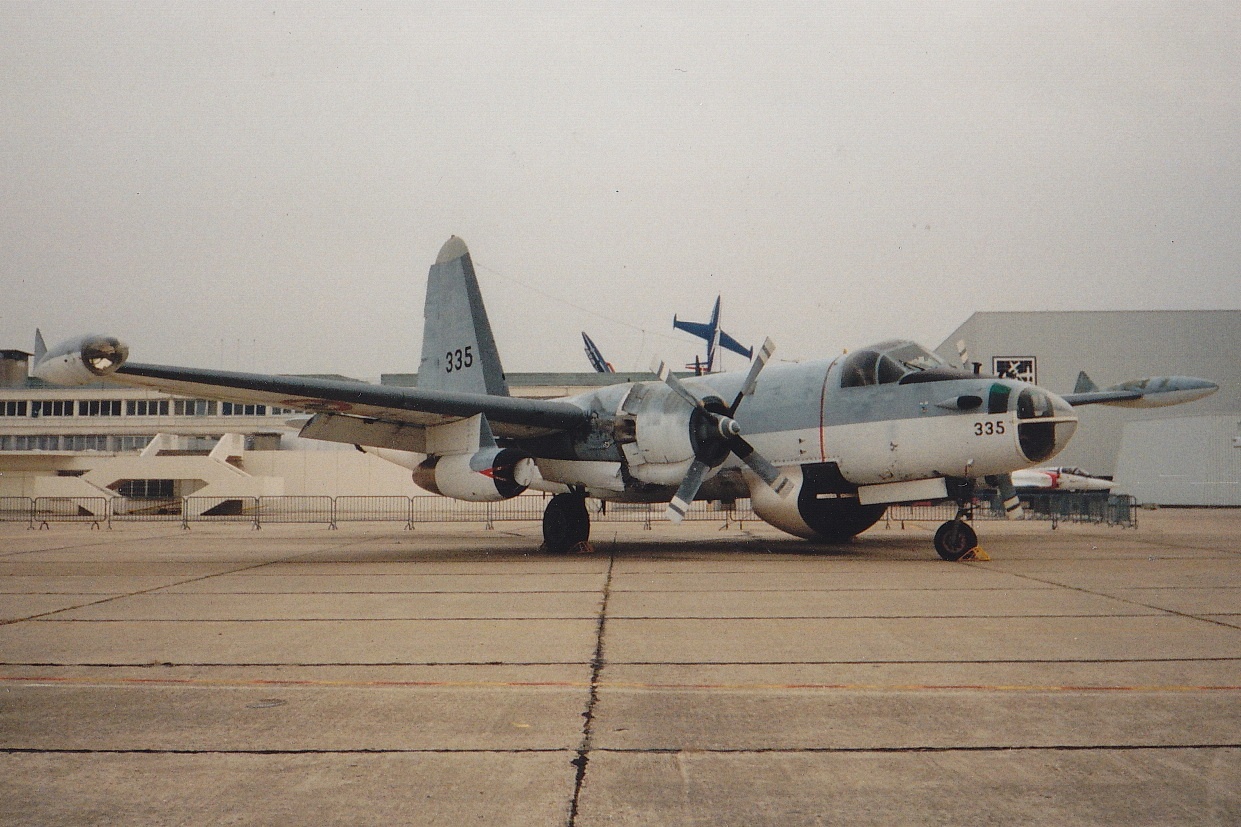 Musée de l'Air et de l'Espace du Bourget